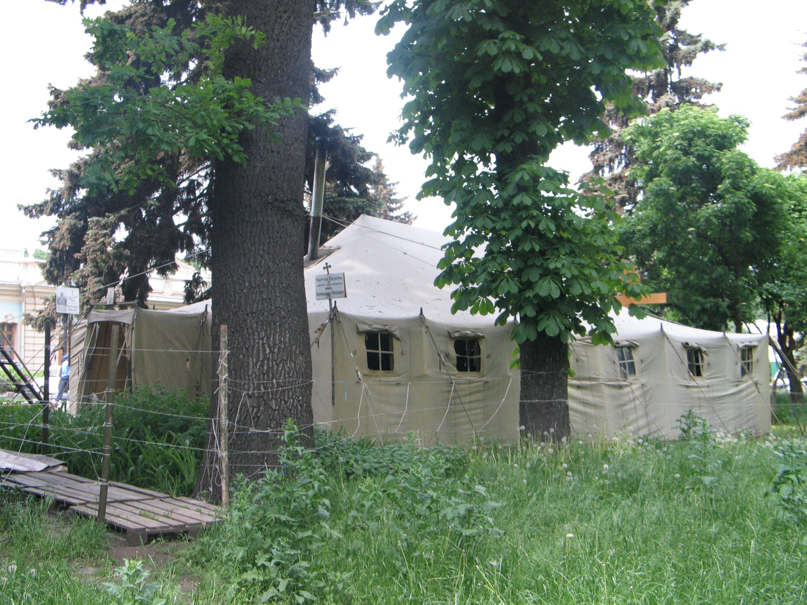 Палаточный городок протестующих в Мариинском парке в Киеве